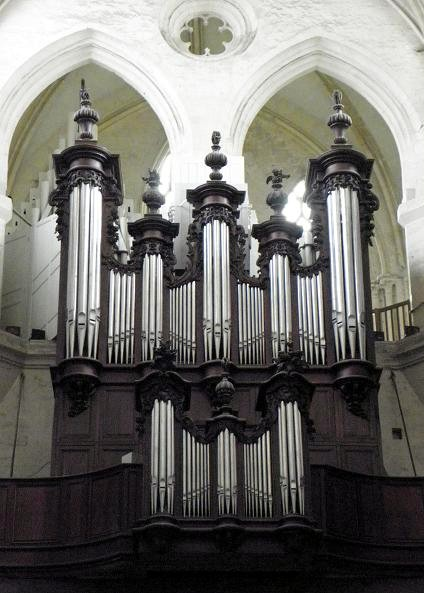 Grandes-orgues de la cathédrale Notre-Dame de Sées (61).